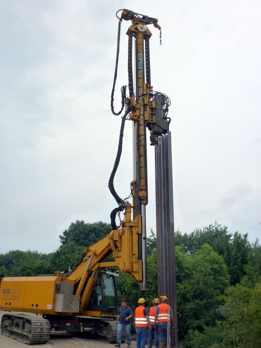 Rammgerät mit Mäkler und Vibrationsgerät